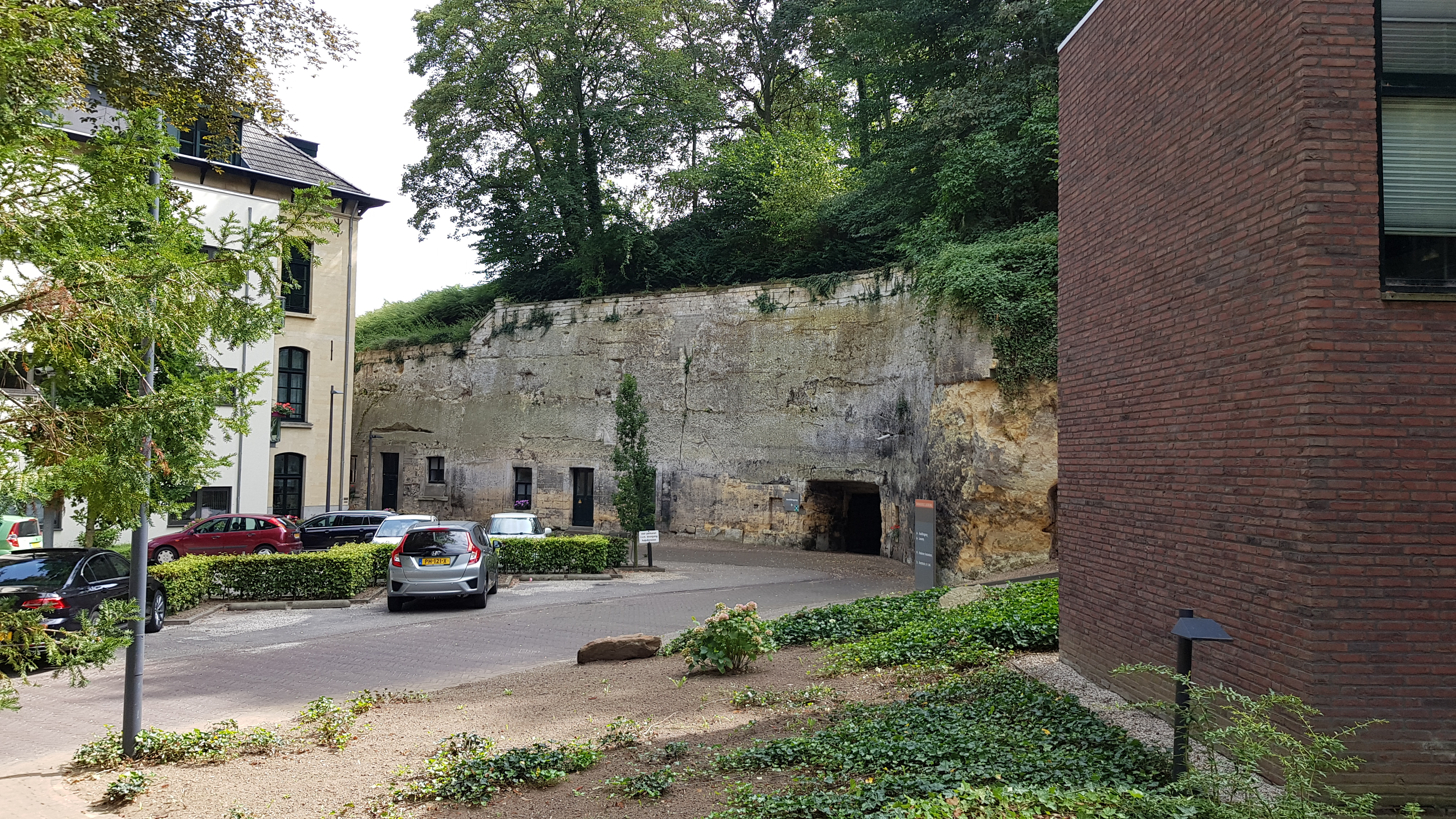 Heilig Hartgroeve, Valkenburg, Nederland